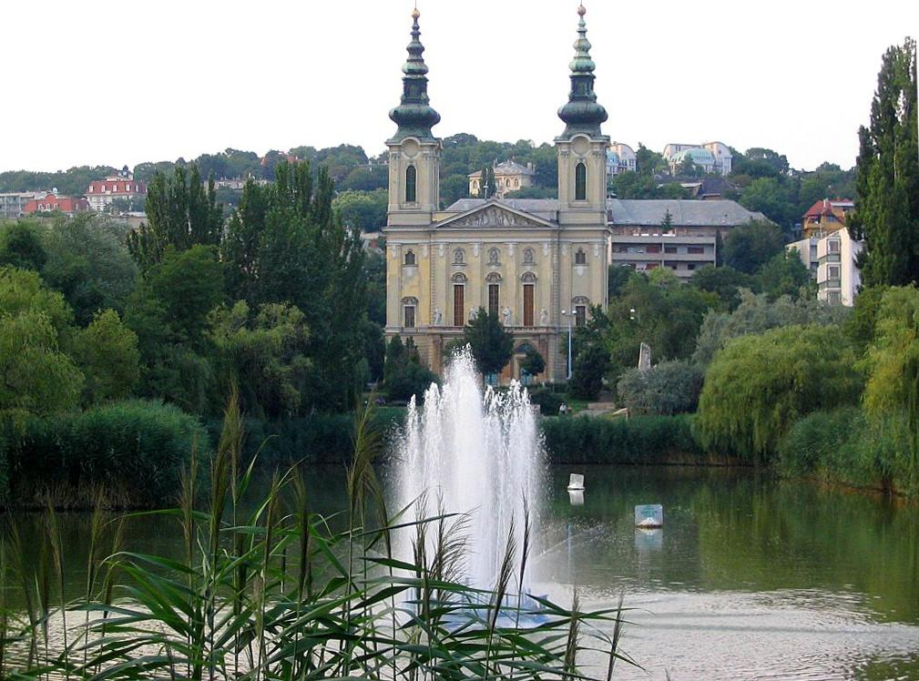 "Feneketlen tó" in Budapest, Hungary